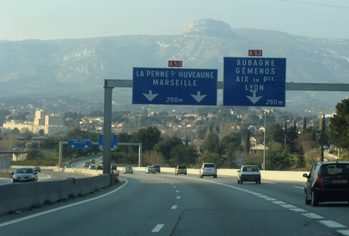 La bifurcation A50-A52 à Aubagne-sud, vue depuis le sud. À l'arrière-plan, le Garlaban (alt. 714 m.)